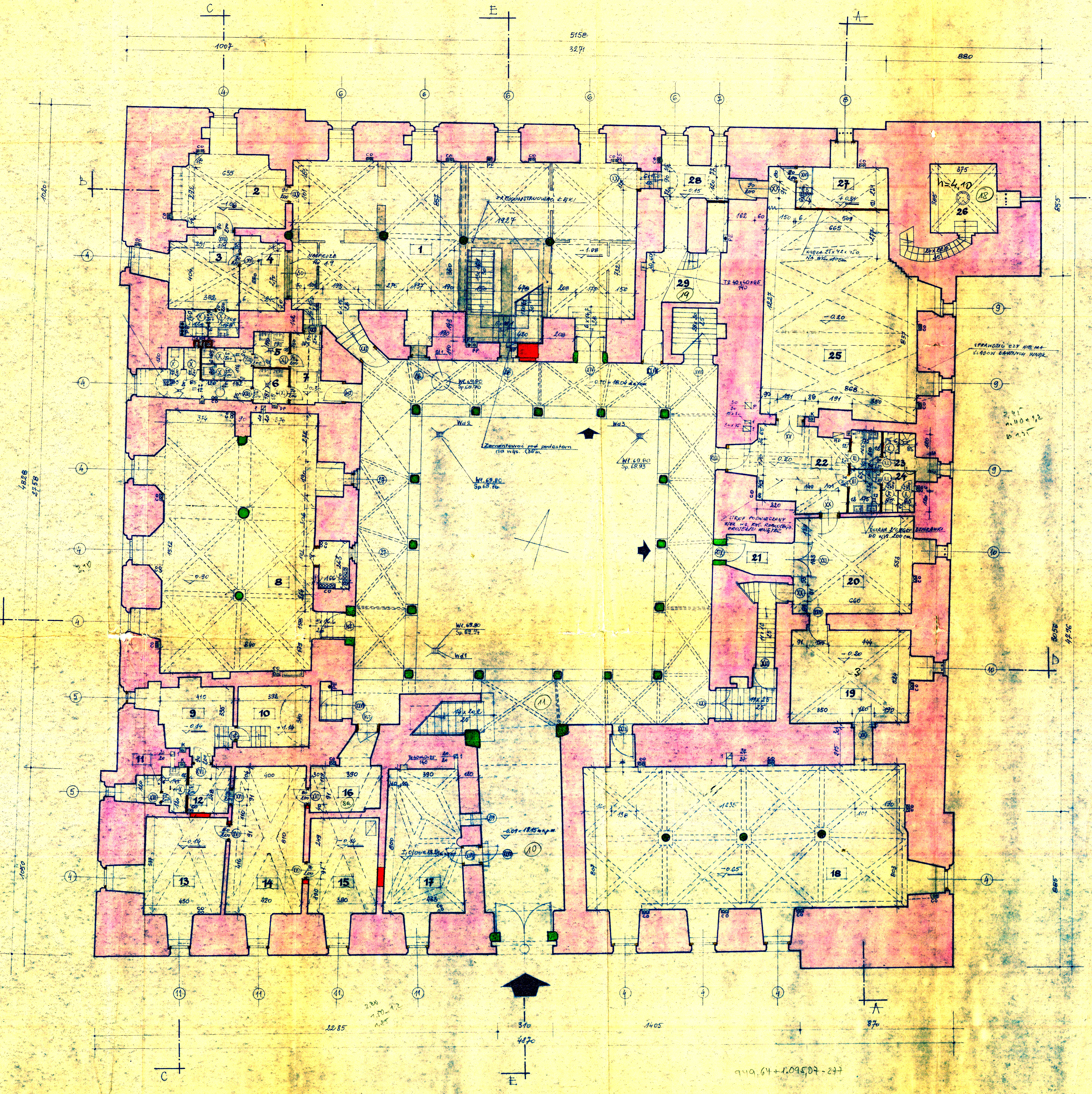 Rysunek z projektu restauracji i adaptacji zamku na muzeum